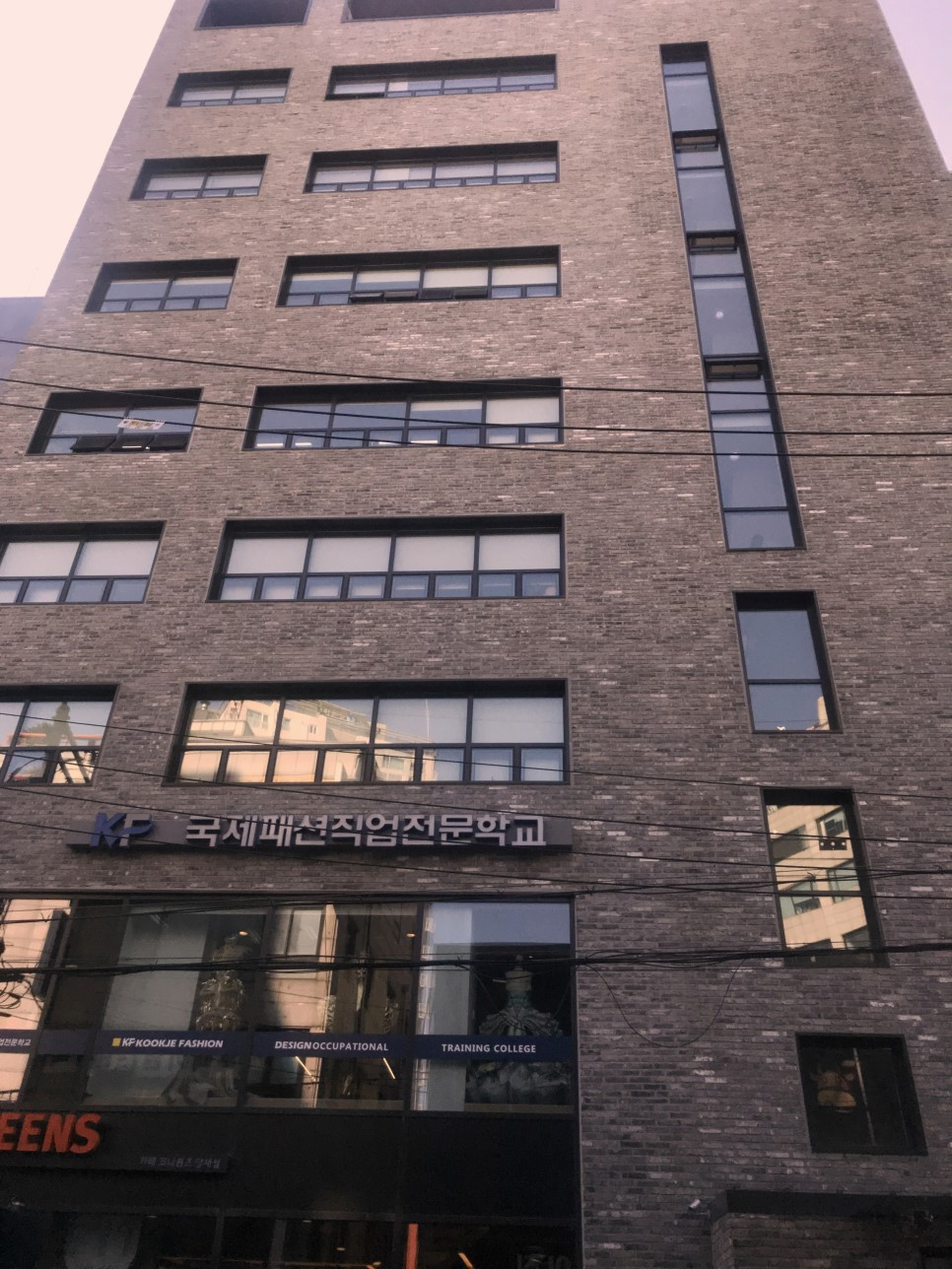 국제패션디자인전문학교 외관